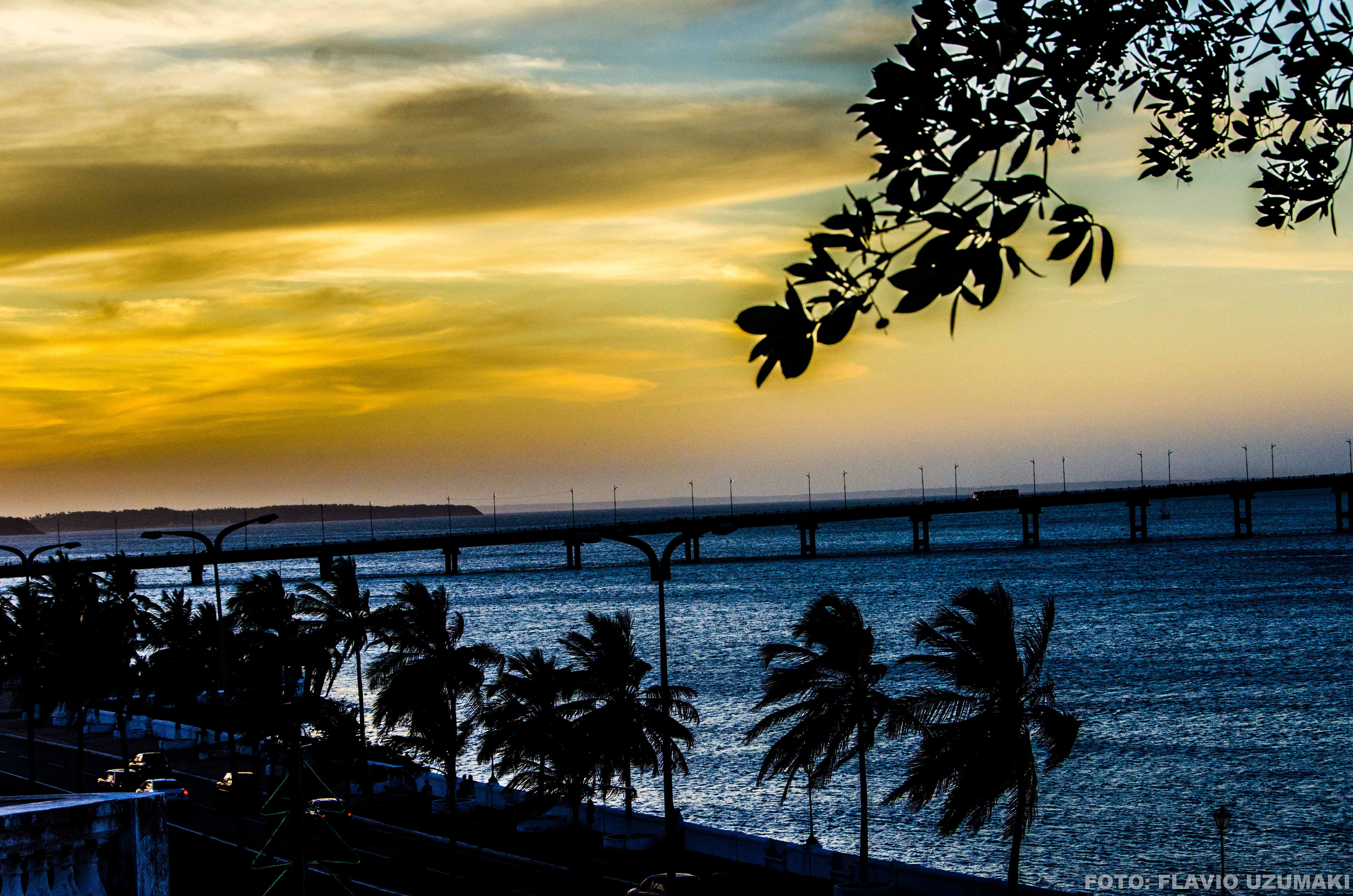 ultimas horas do dia, praça Gonçalves dias vista da Ponte do São Francisco (Governador José Sarney) (São Luís)